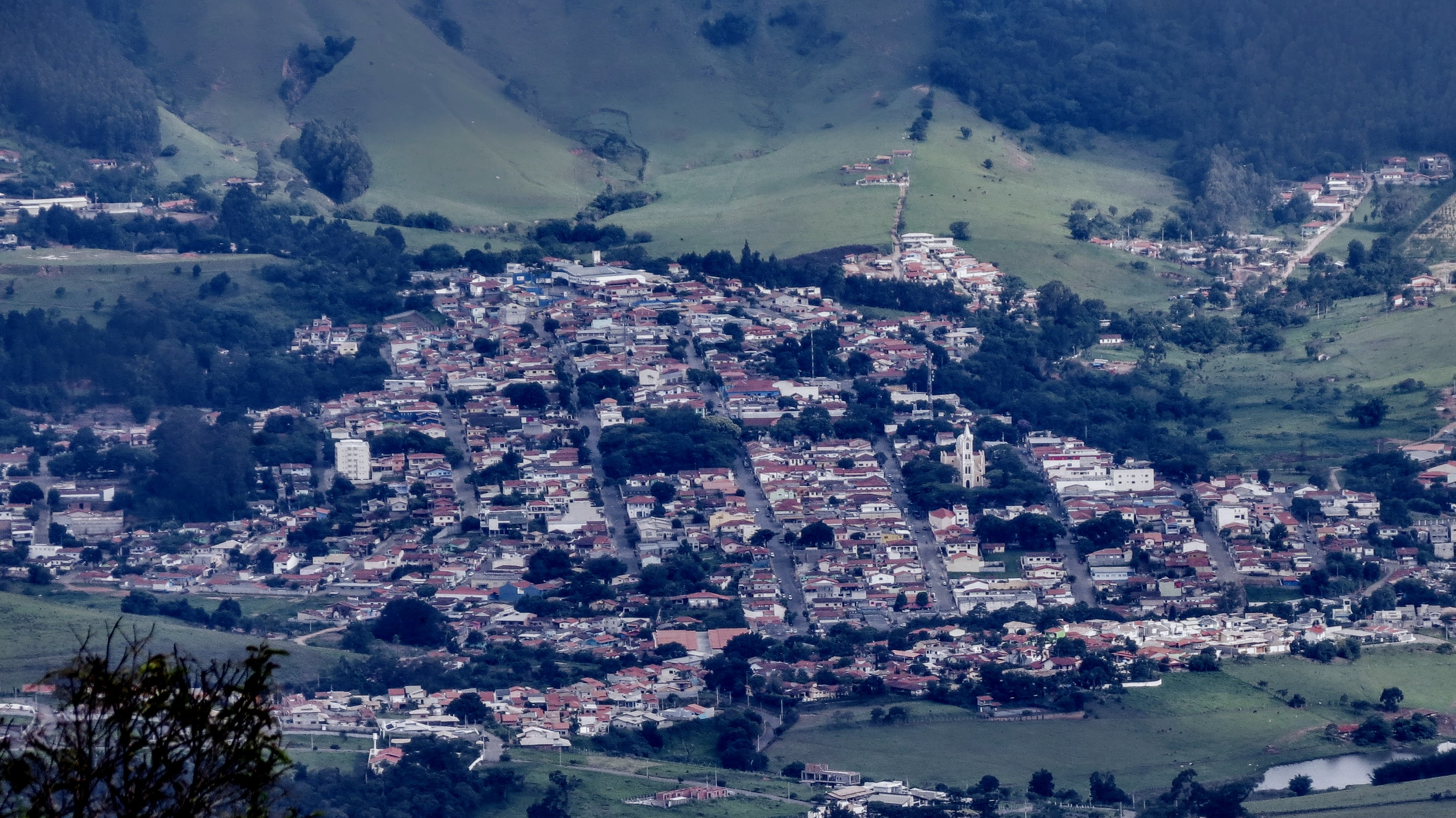 Área urbana da cidade de Joanópolis vista da rampa de voo livre.